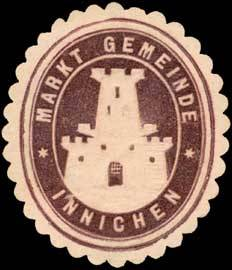 Sealing stamp Title: Markt Gemeinde Innichen Description: dunkelbraun, hellbraun, geprägt Place: Innichen size: 4x4 cm